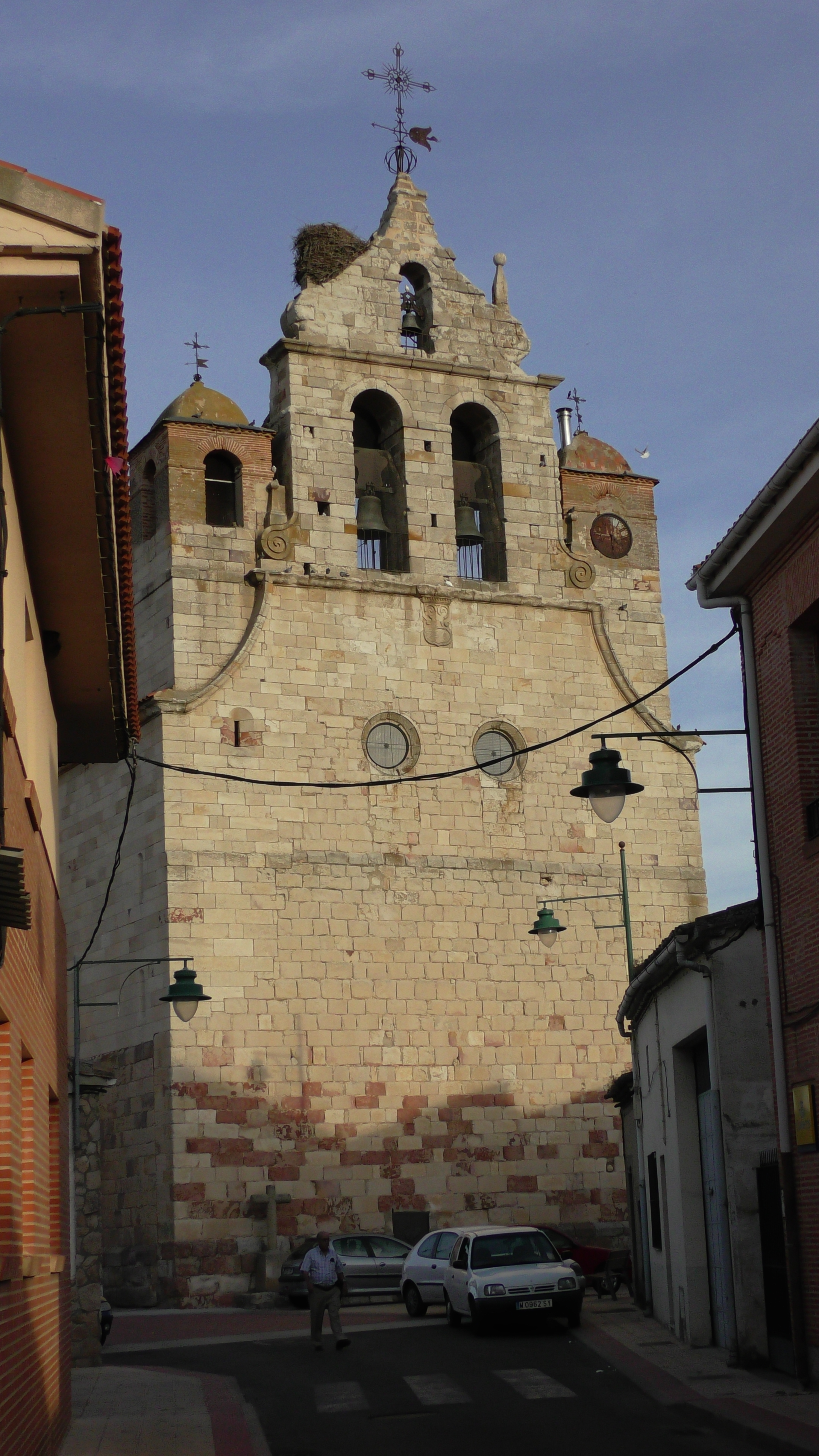 Villaralbo